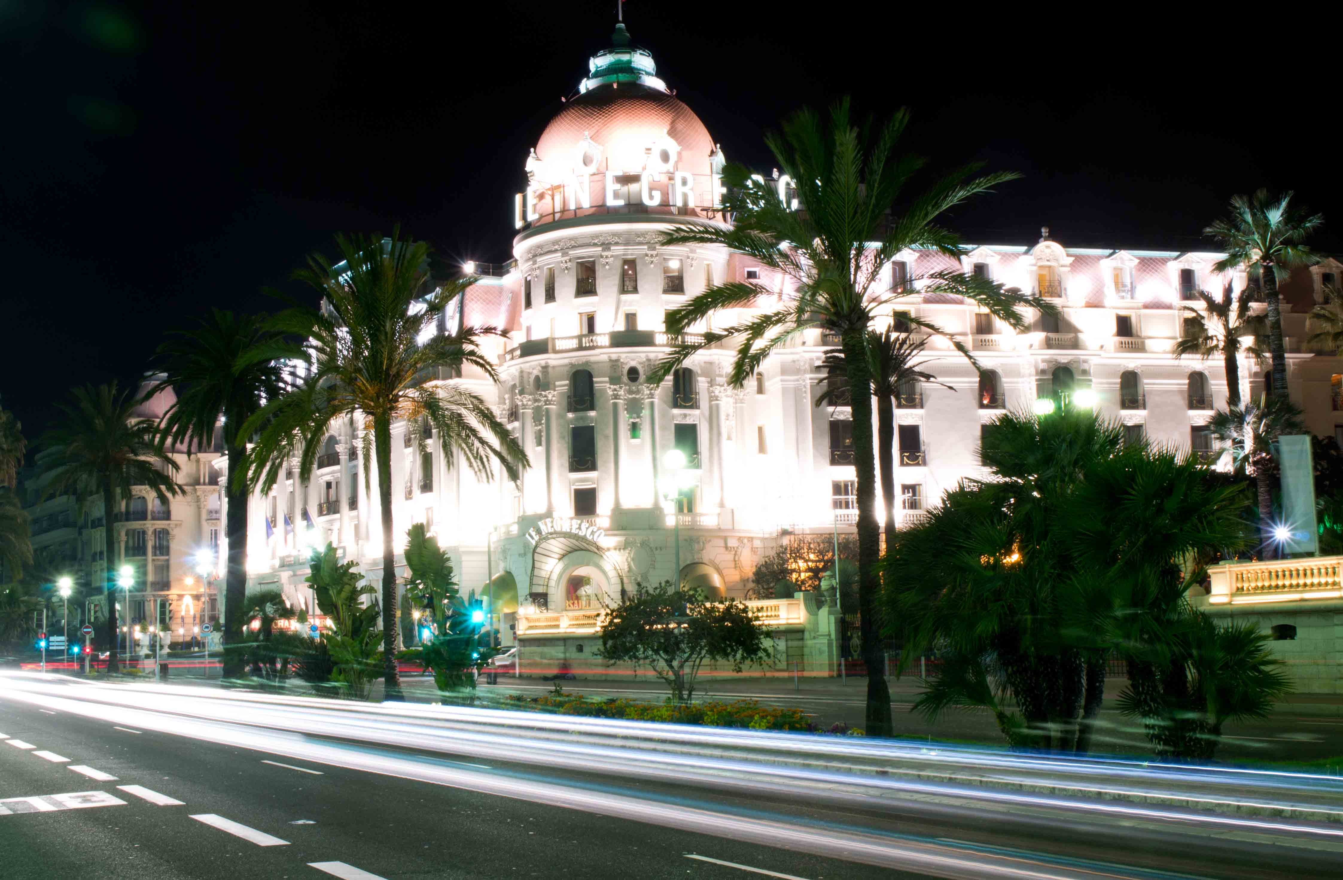 L'hôtel Negresco de nuit.